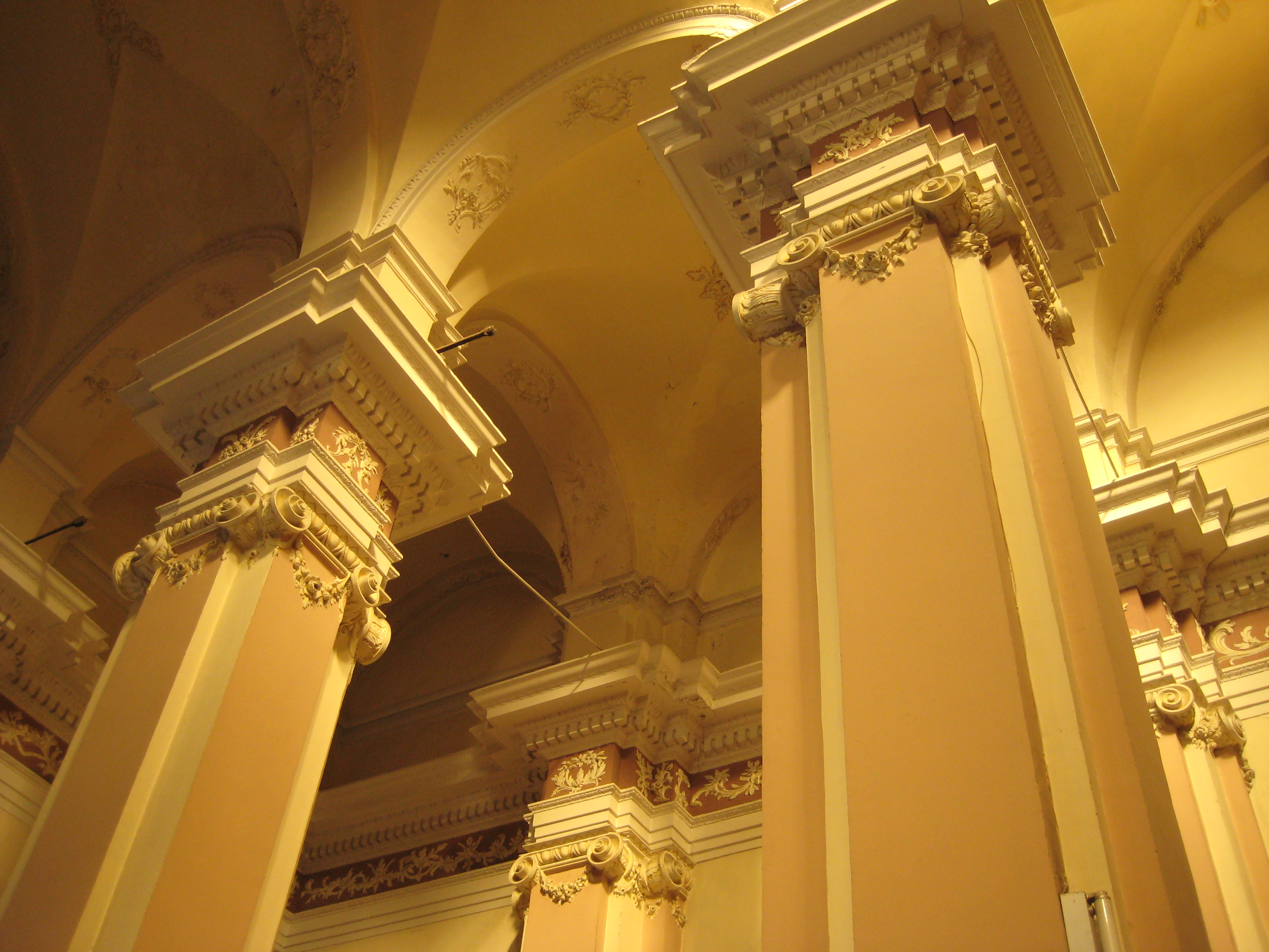 Interior de l'església de Sant Cristòfol de Ribesalbes (Plana Baixa)